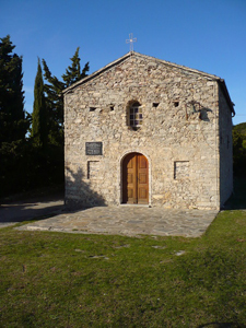 Casevecchie (Haute-Corse) - Chapelle San Michele